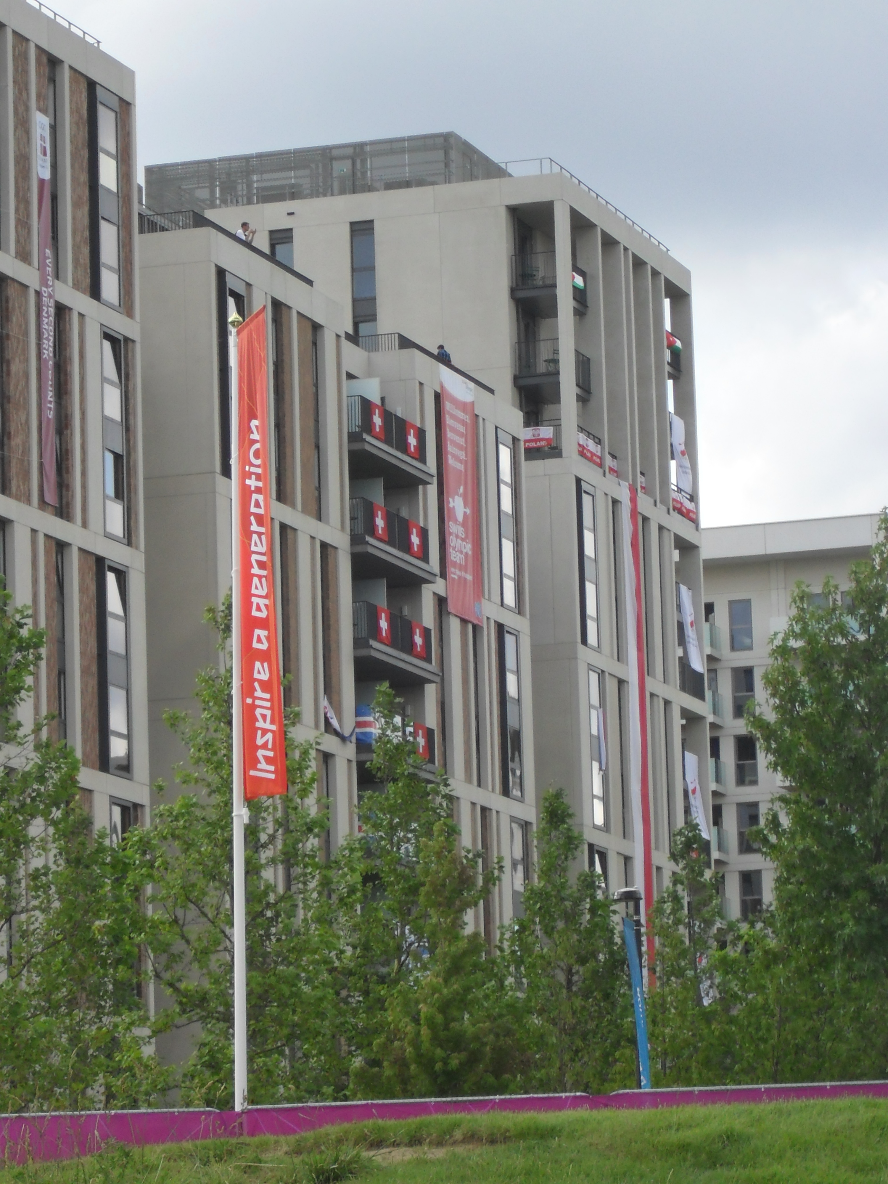 Appartements de l'équipe suisse olympique au village olympique de Londres